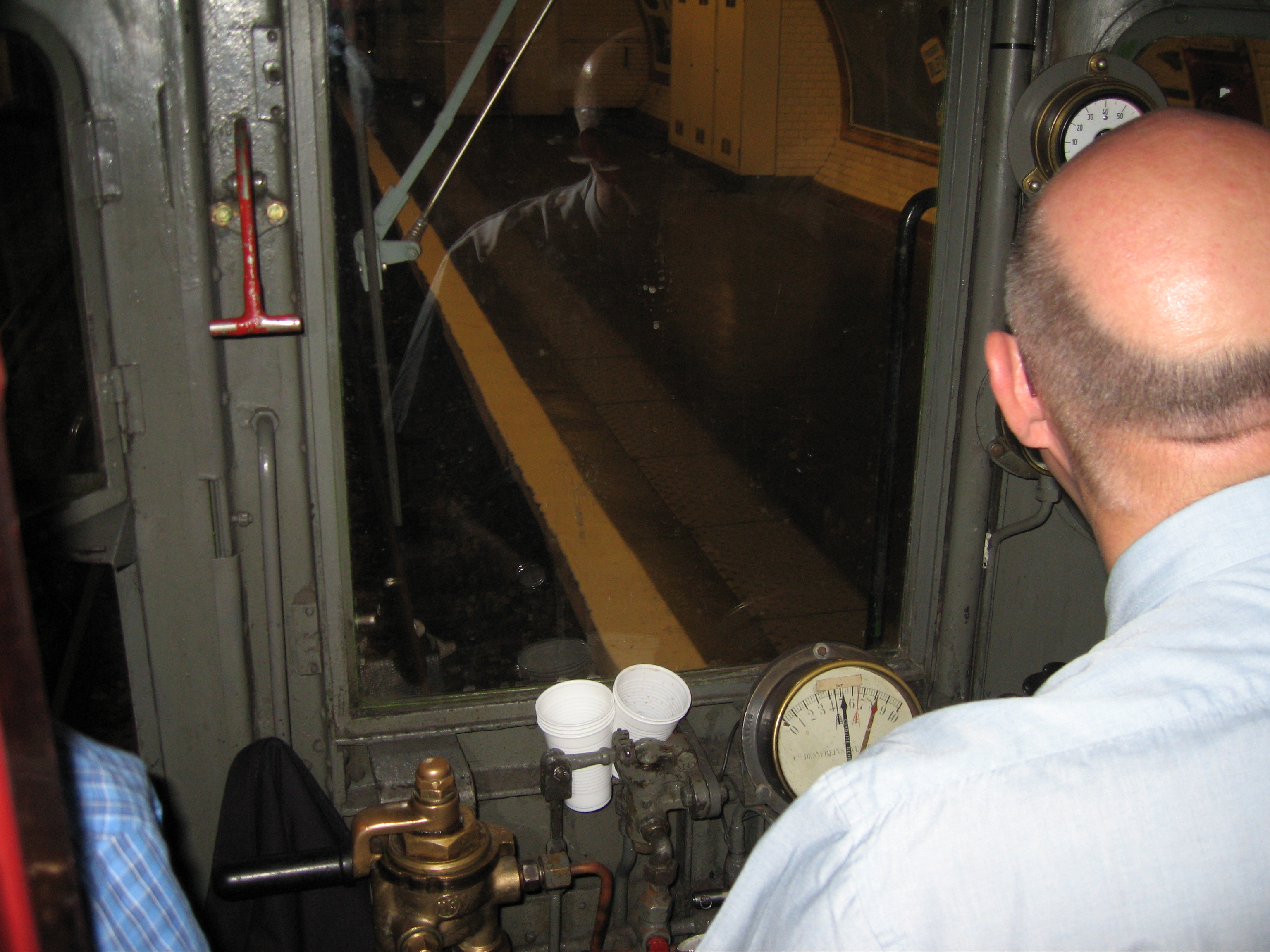 Journées du patrimoine RATP 16-17/09/2006. Cabine Sprague-Thomson.